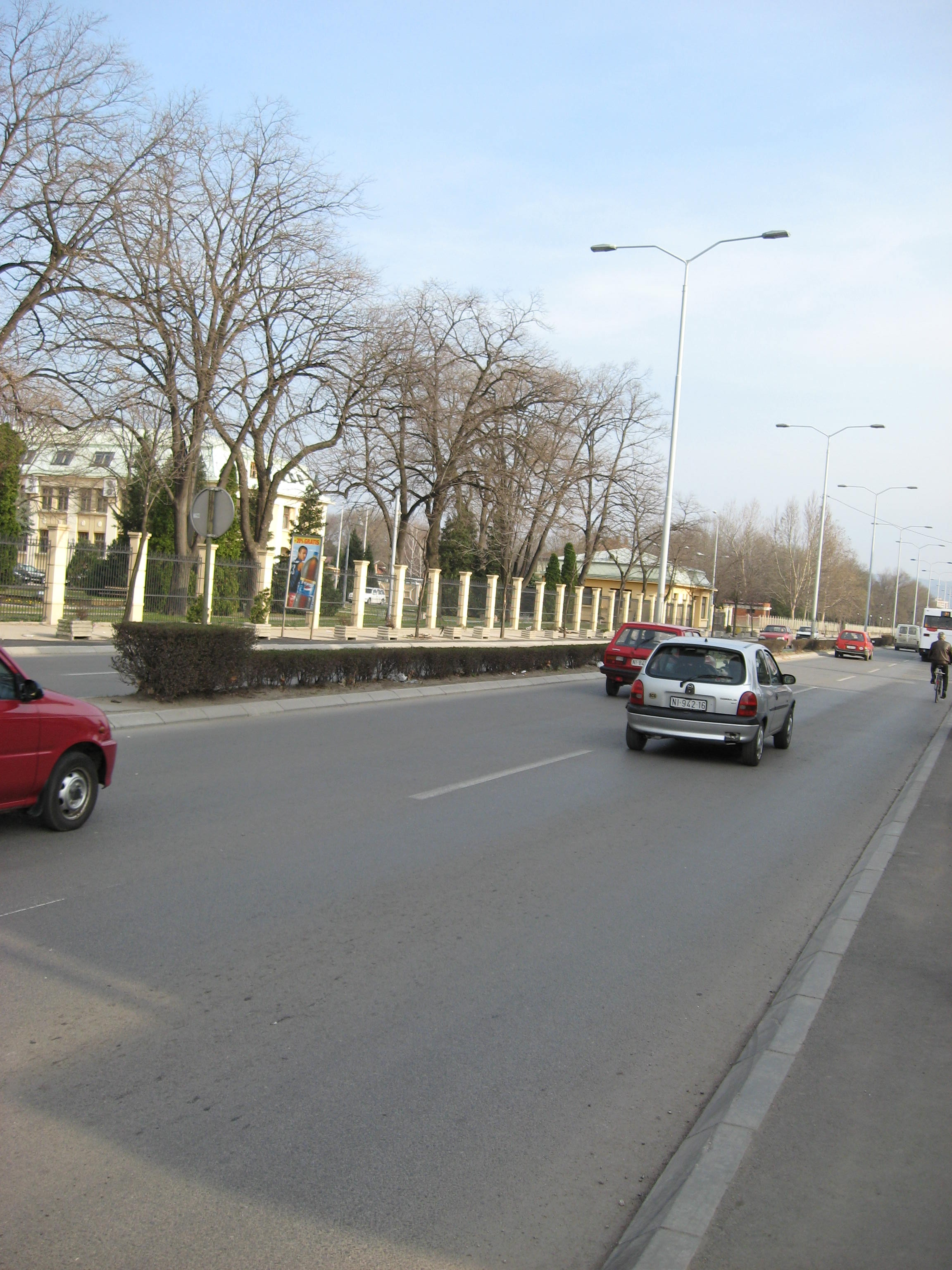 Dragan Cvetkovic Niš